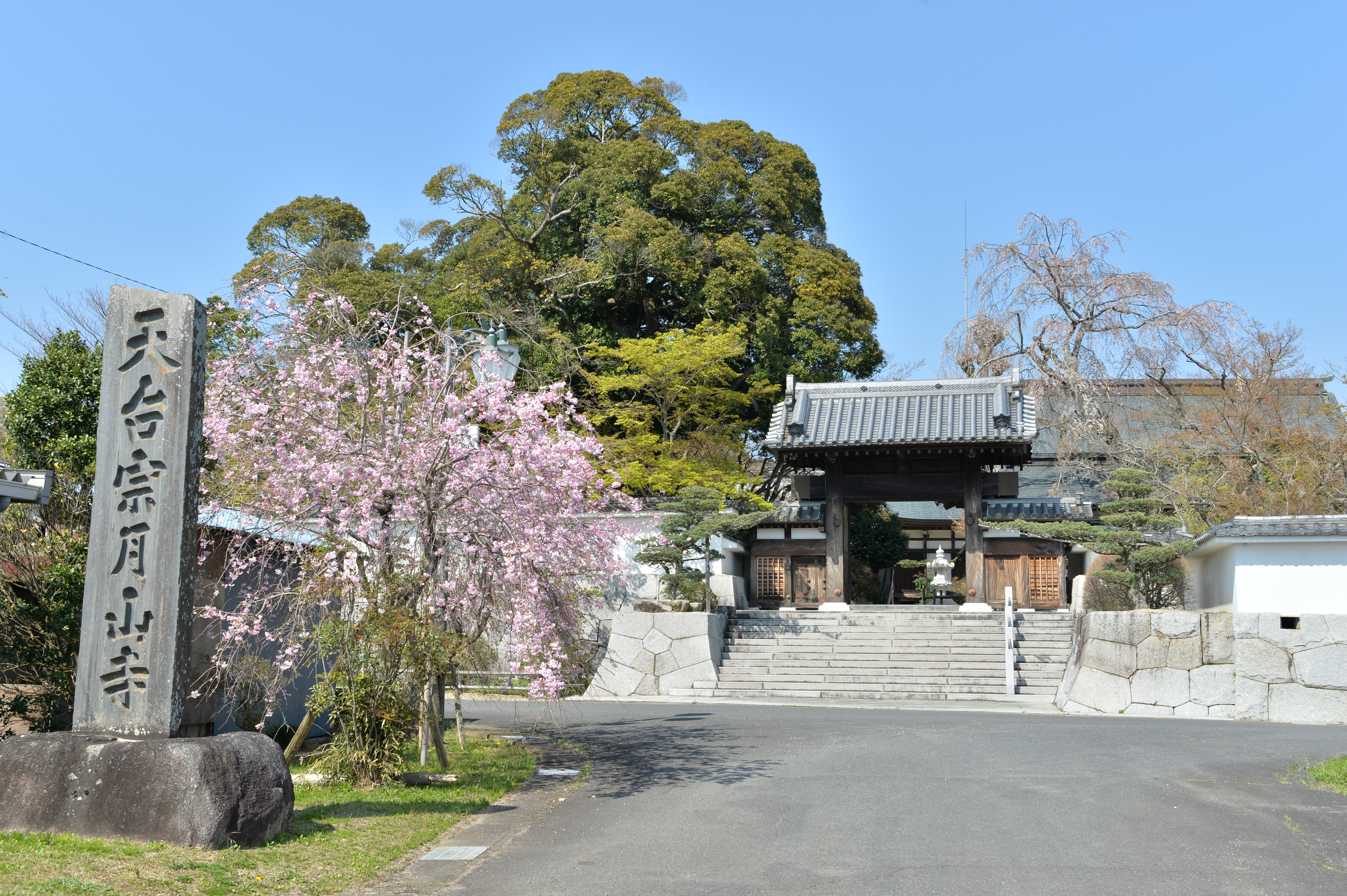 茨城県桜川市西小塙にある、天台宗の寺院。山号は曜光山。山門前から撮影。